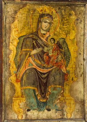 „Света Богородица с Христос“, Лешочки манастир, с. Лешок. 1831 година. Автор Кръсте Зограф от Велес. Размери: 56 Х 40,5 Х 3,5 cm.